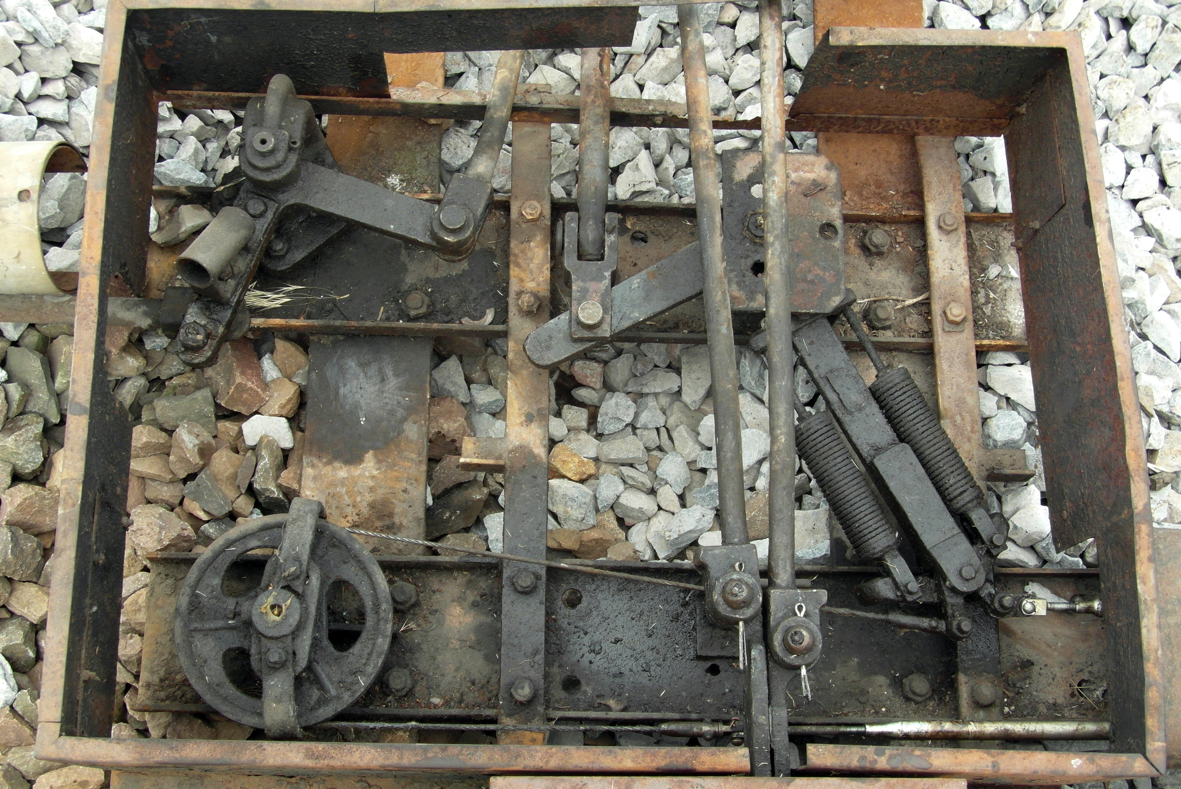 Bahnhof Rottleberode Süd, Weiche 2a/b, Einheitsbauart mit Winkelhebel in Schweißausführung und zusätzlichem Winkelhebel. Die oben durchlaufenden Stangen sind die Riegelverbindungsstangen zum hintenliegenden Riegel. Der ungleichschenklige Winkelhebel übersetzt die 500 Millimeter Leitungsstellweg auf 220 Millimeter Regelweg der Schieberstange. Der kurze Schenkel des Winkelhebels ist etwas länger als normalerweise notwendig, er kann zusätzlich gebohrt werden, wenn ein Schieberstangenweg von 240 Millimetern benötigt wird. Die Federn bilden mit den Sperrklinken und dem mittleren Sperranschlag die Drahtbruchsperre. Reißt ein Strang, zieht die dazugehörende Feder die Sperrklinke nach innen und der durch den Spannwerkszug belastete Antrieb kann nur bis zum Sperranschlag bewegt werden. Ein ungewolltes Umstellen bei Drahtbruch in einer Endlage wird damit verhindert. Die Spannschrauben dienen der Feineinstellung, der Winkelhebel oben links als Abgriff zu einem eventuell vorhandenen zweiten Verschluss oder zu einem Weichensignal, insbesondere bei doppelten Kreuzungsweichen.